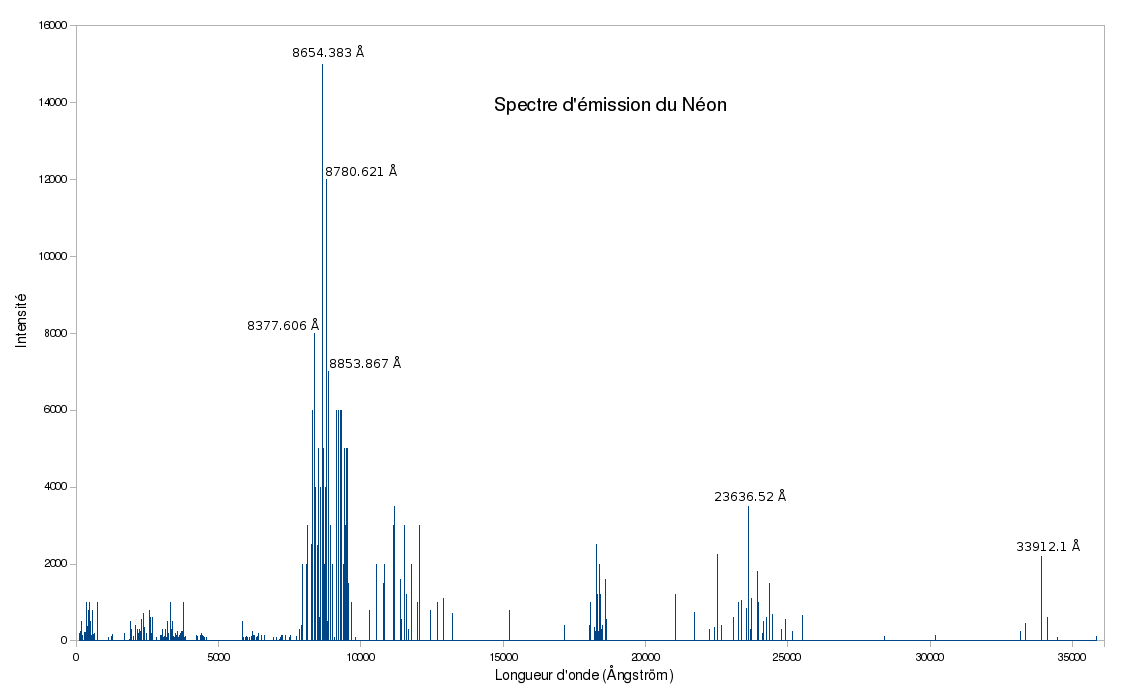 Raies d'émission du Néon